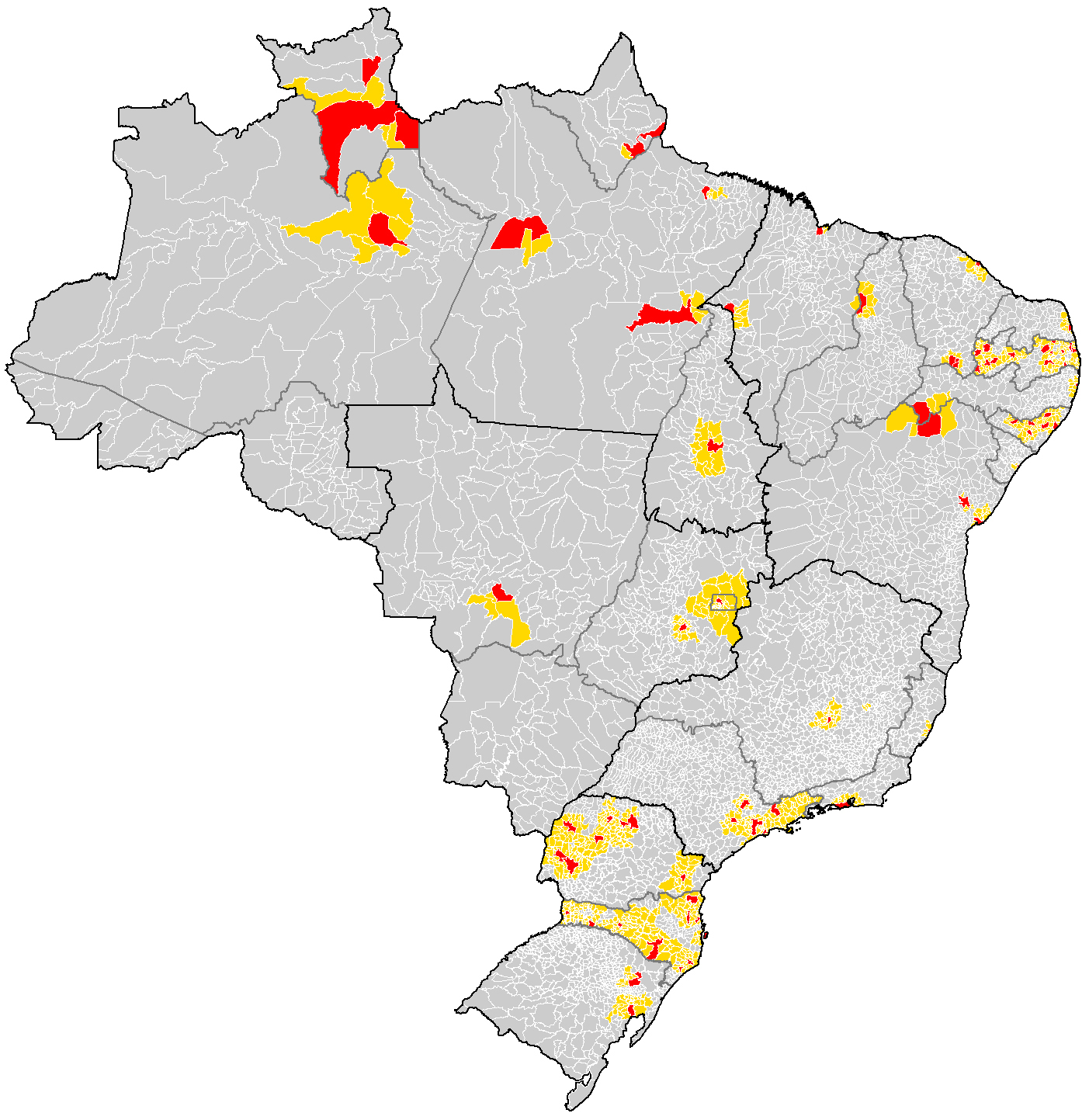 Regiões Metropolitanas do brasil 2015